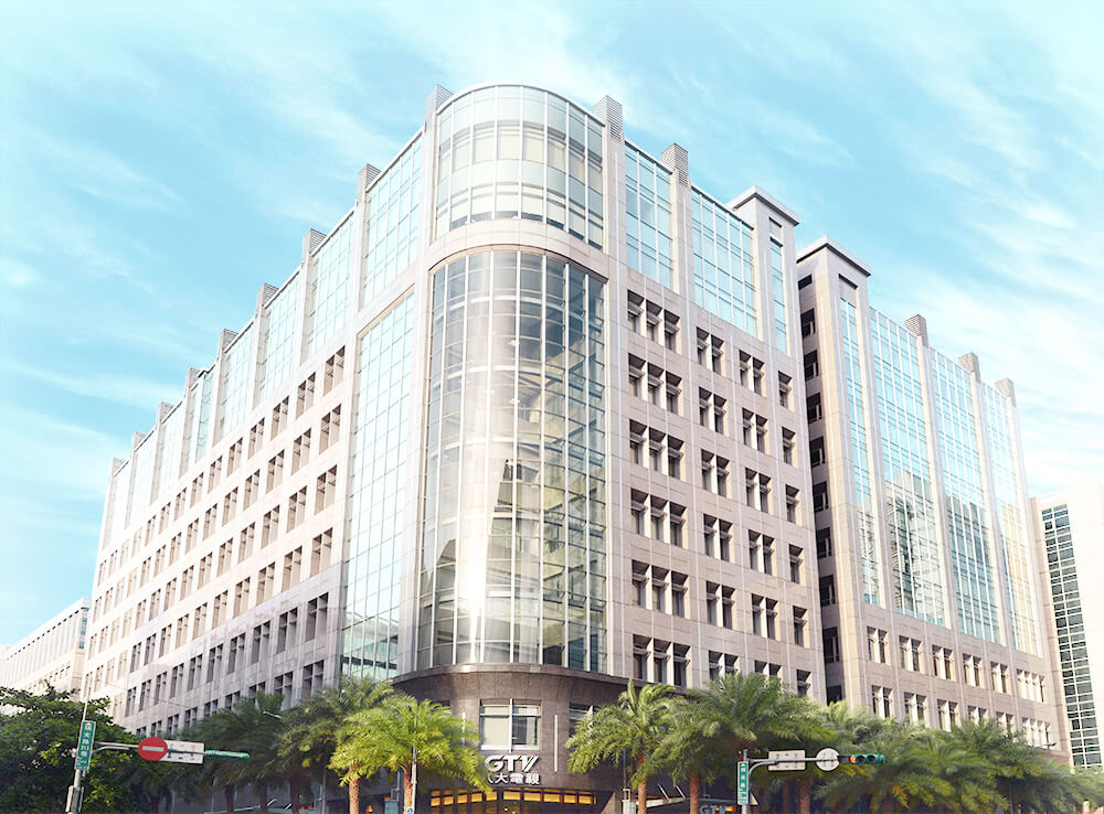 八大電視總部大樓，地址：臺北市內湖區瑞光路455、457號。